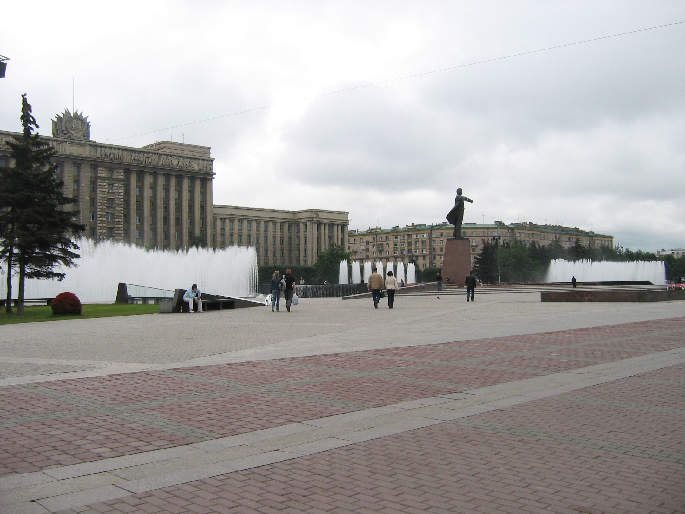 Moscovskaya ploshad vid na ylicy Tipanova